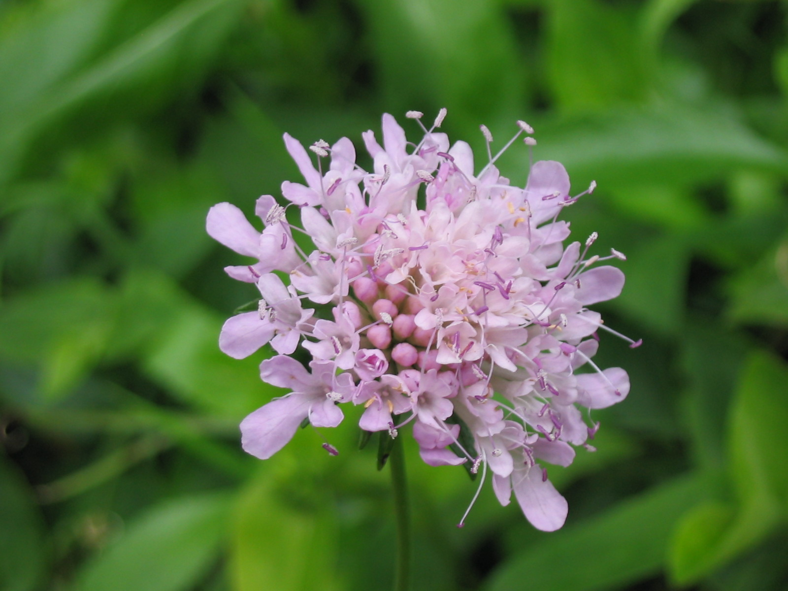 Glänzende Skabiose (Scabiosa nitens) - Blüte